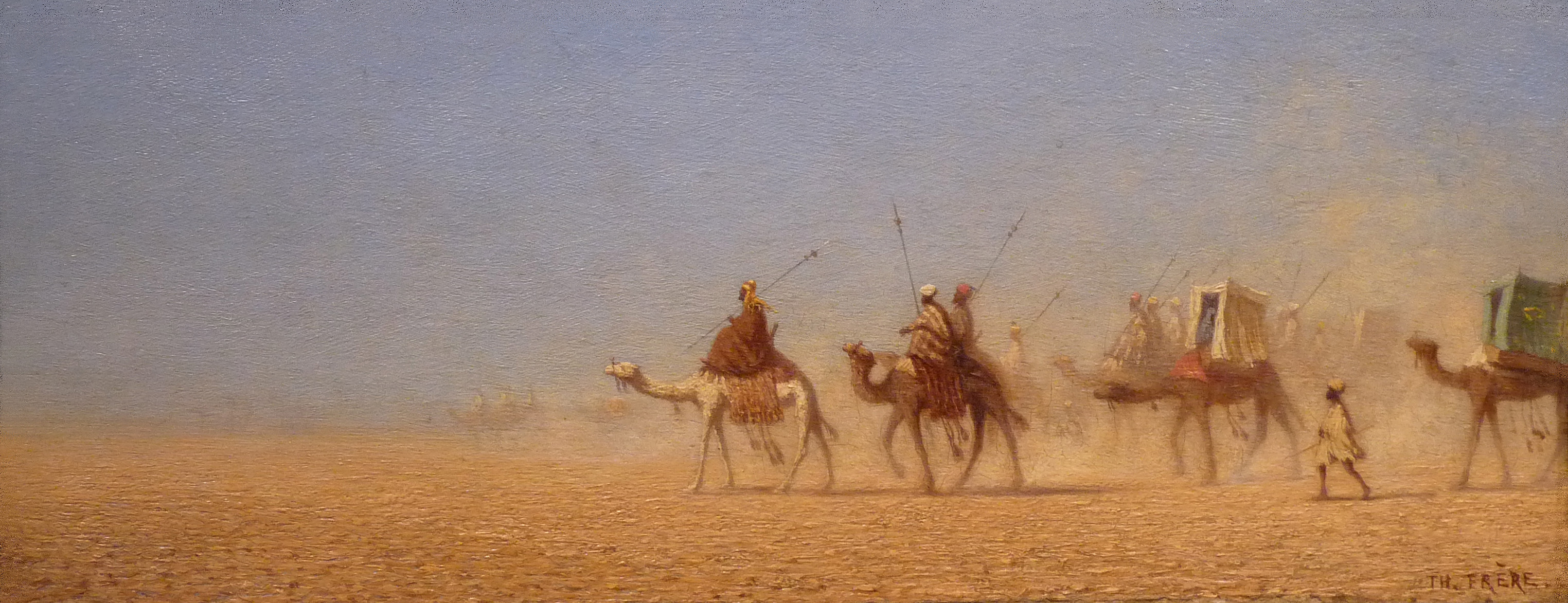 Théodore Frère, Caravanes traversant le désert, Musée des beaux-arts de Reims